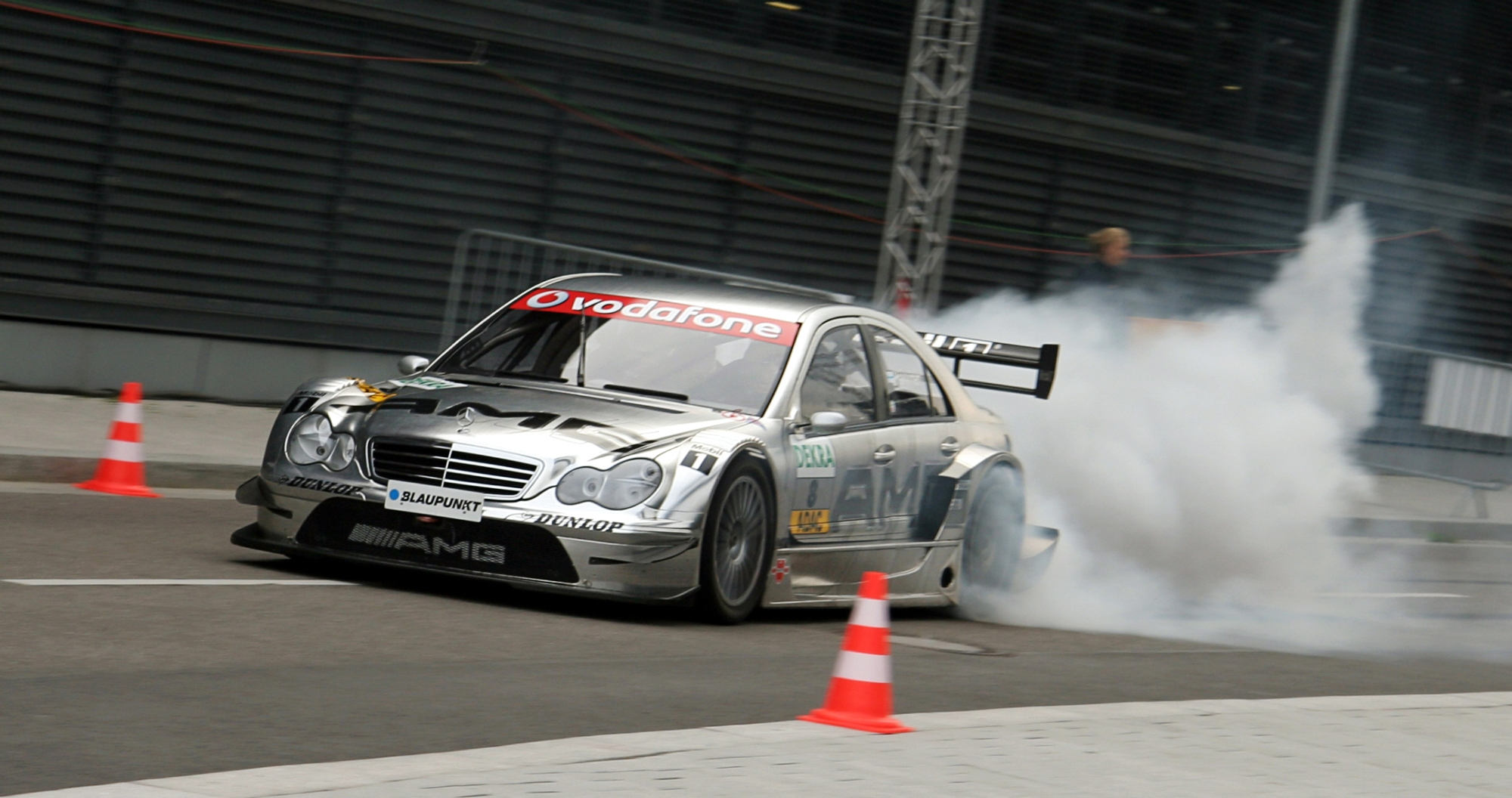 DTM car Mercedes-Benz AMG 2006 (C-Class, W203), Mika Häkkinen (driver)